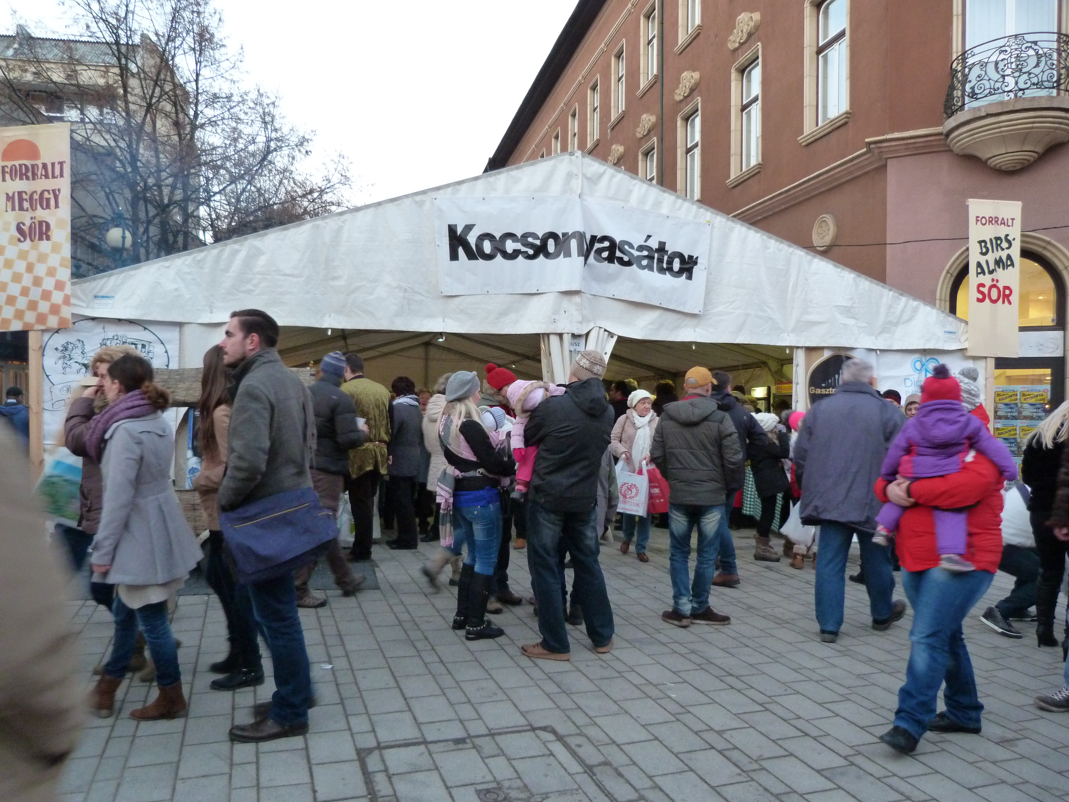 A felvétel 2015. február 7-én szombaton készült Miskolcon. Miskolci Kocsonyafesztivál. ©© Derzsi Elekes Andor, Budapest, 2015, Published in the Metapolisz DVD line. You are authorised to use this vid under Creative Commons – even for commercial, for profit purposes. The vid must be attributed to Derzsi Elekes Andor. All of the photos and vids in the Metapolisz DVD line are under Creative Commons and can be used even for commercial – for profit – purposes. Recommended Citation Derzsi Elekes Andor: Metapolisz DVD line